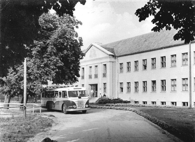 Zentralbild-Weiss Wei-Ho 29.8.1958 Aus dem Institut für Landtechnik in Potsdam - Bornim "Die Weiterentwicklung der energetischen Basis, insbesondere die schnellere Entwicklung von allradgetriebenen Schleppern und Triebsätzen, sowie die Entwicklung von Vollerntemaschinen, die auch unter schwierigen Bodenverhältnisse eingesetzt werden können und funktionssicher sind", diese Hauptaufgabe stellte der V. Parteitag auf demGebiet der Landtechnik. Dem Institut für Landtechnik der Deutschen Akademie der Landwirtschaftswissenschaften zu Berlin in Potsdam-Bornim fällt hierbei die Aufgabe zu, grundlegende Forschungsarbeiten durchzuführen. UBz: Blick auf das Hauptgebäude des Instituts."